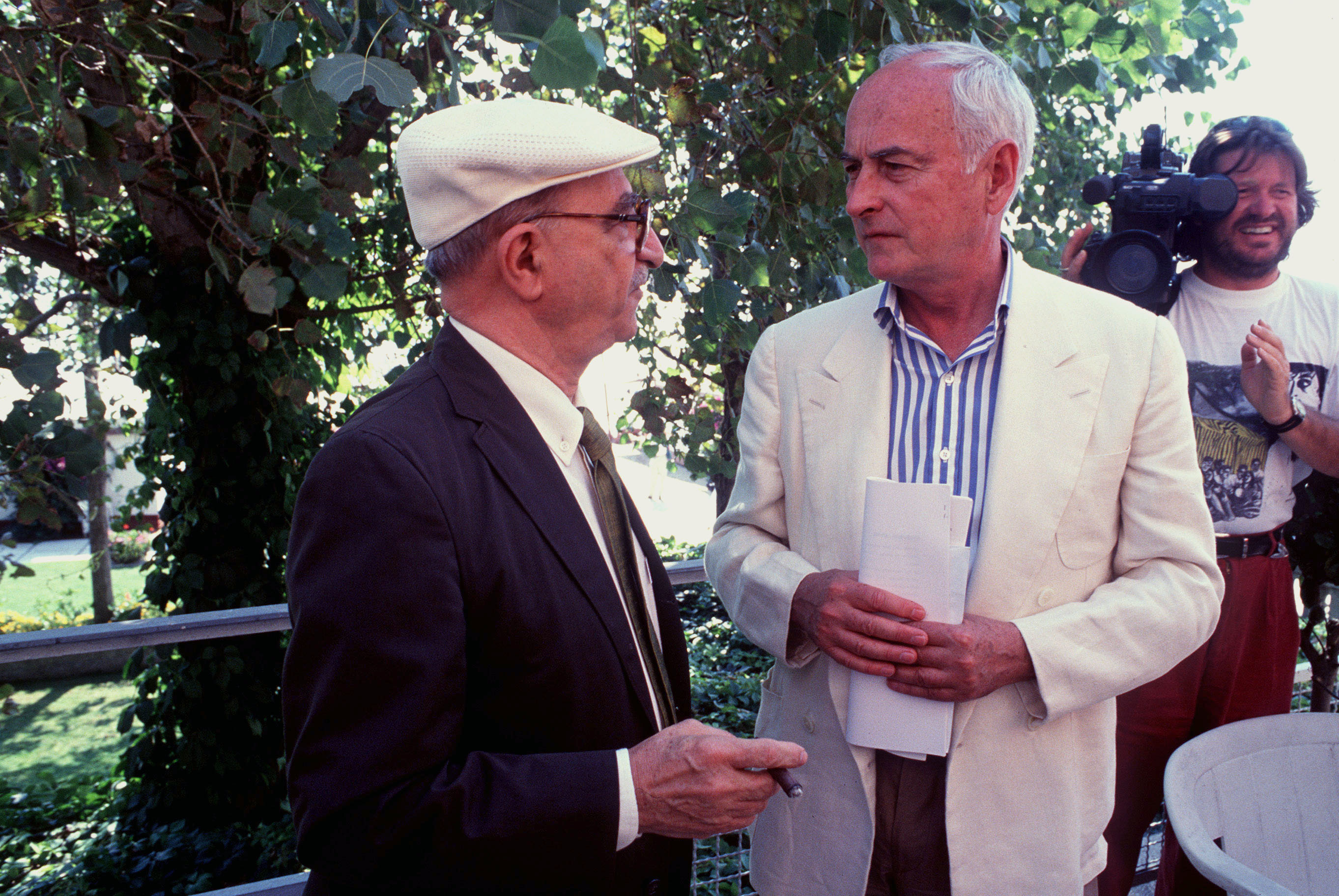 Il regista Alberto Lattuada con James Ivory alla Mostra del cinema di Venezia del 1991